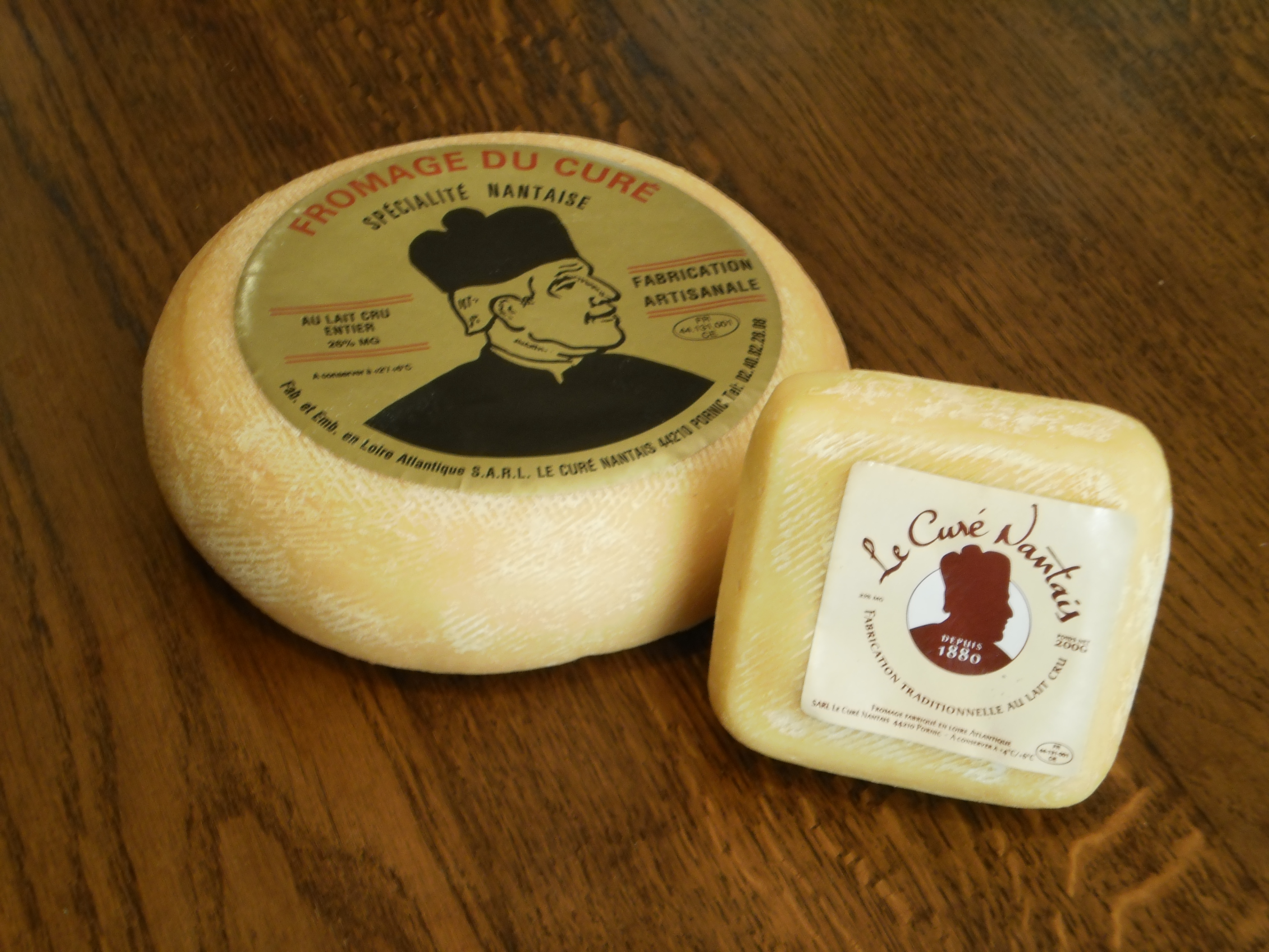 Fromages portant le label Curé nantais